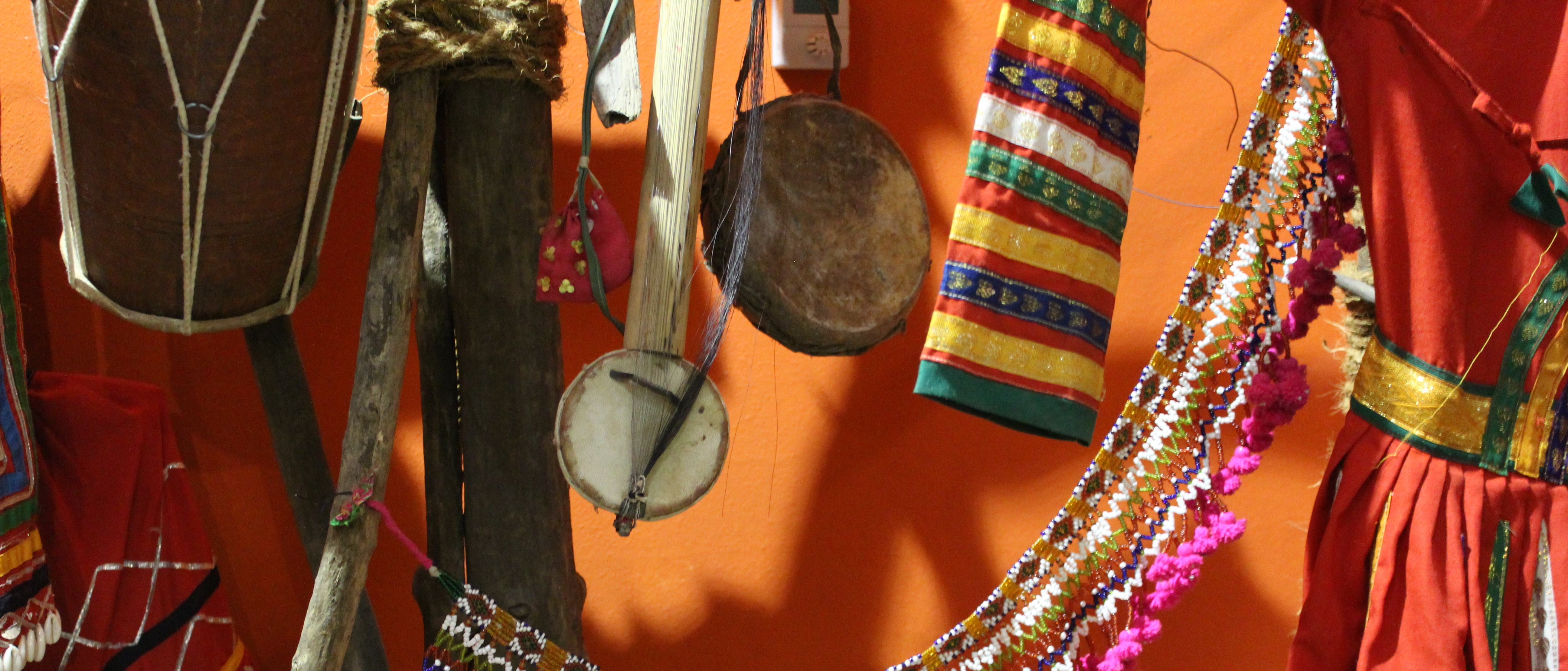 Stálá expozice - Příběh Romů, Muzeum romské kultury v Brně